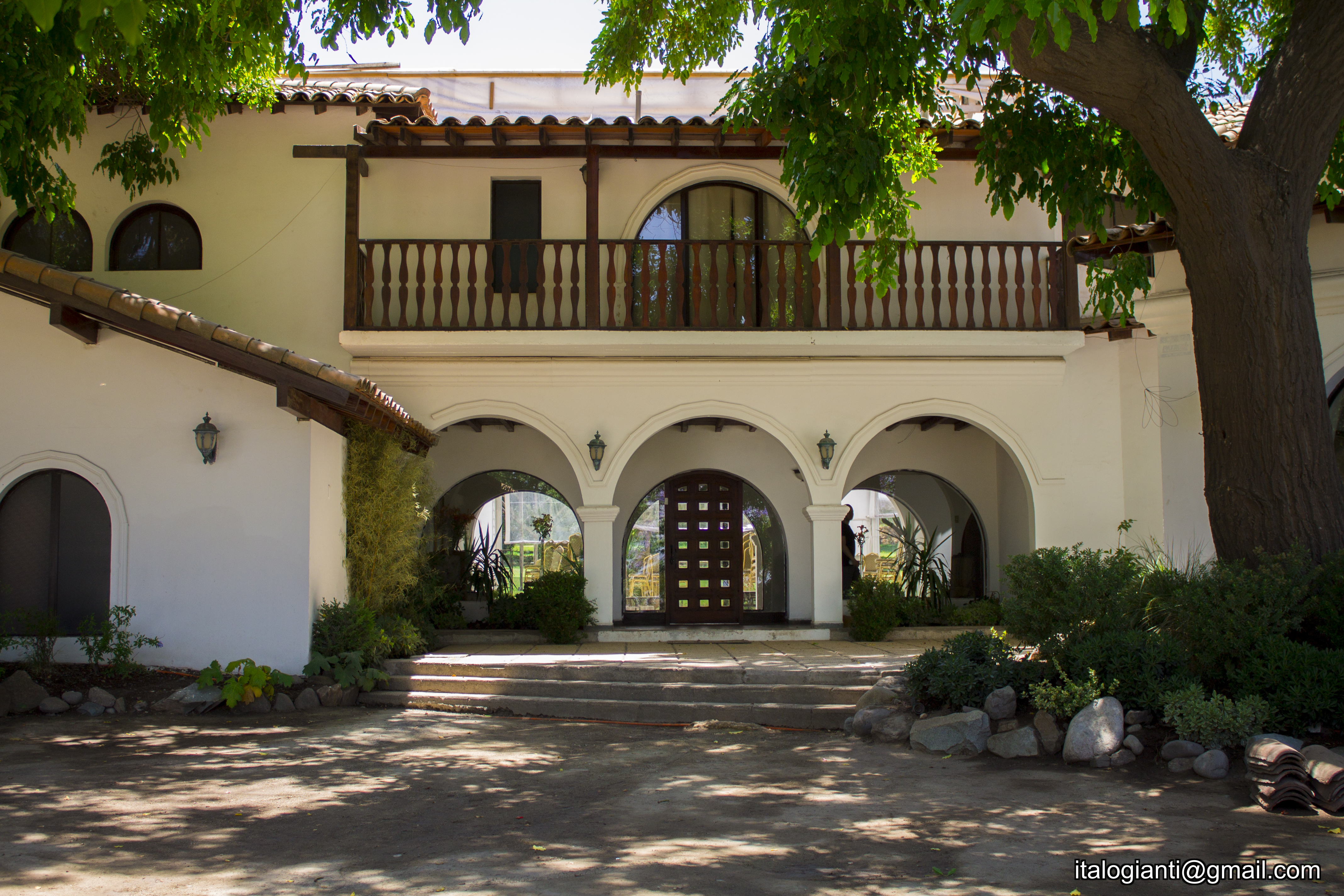 Hacienda Tobalaba. Lo Cañas, Santiago de Chile